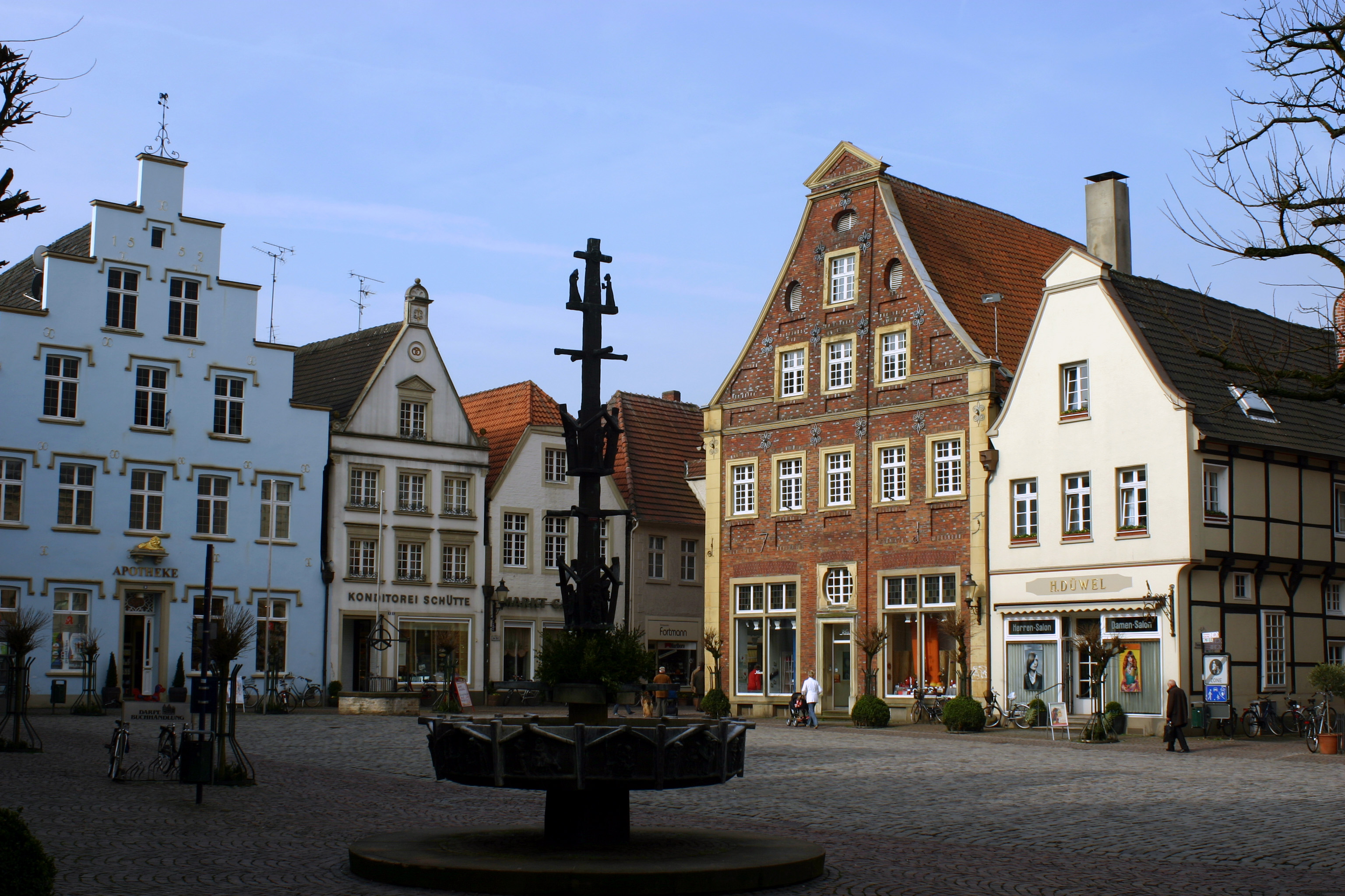 Warendorf, Markt